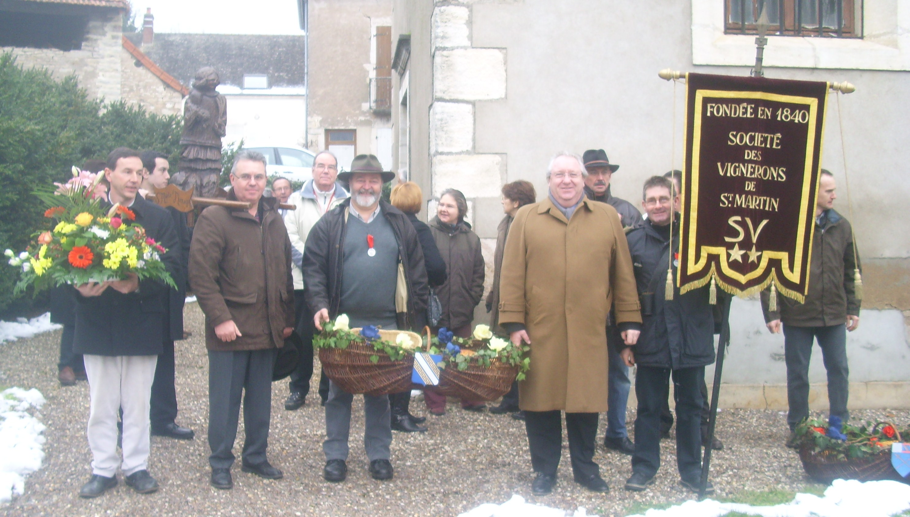 Fußgruppe der Société des vignerons de Saint-Martin-sous-Montaigu, als Beitrag zur Fête de la Saint-Vincent 2010